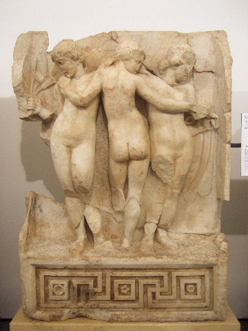 Aphrodisias (Museum): die drei Grazien